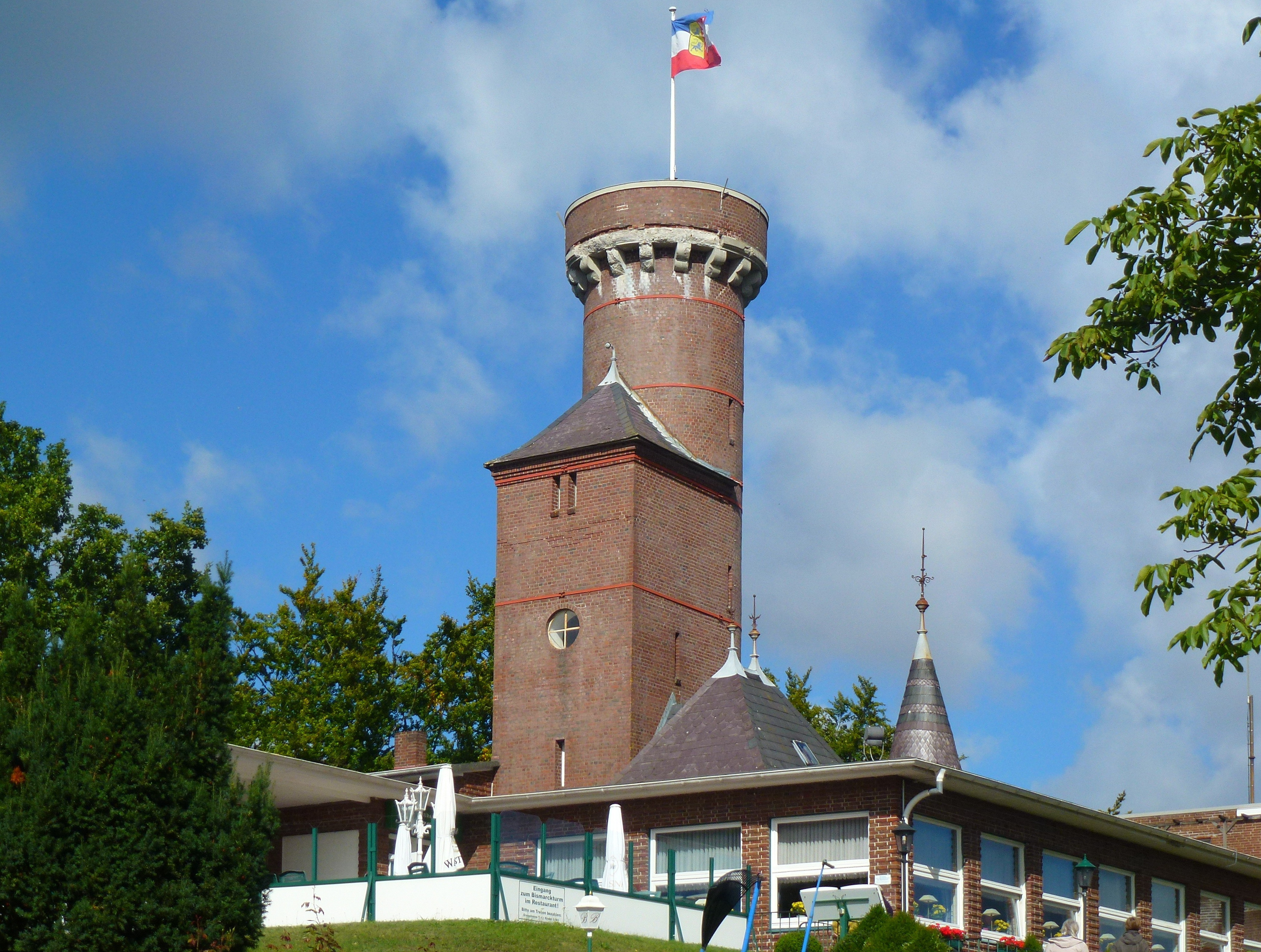 Lütjenburg, Bismarckturm